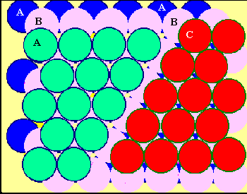 Vrstevná chyba.